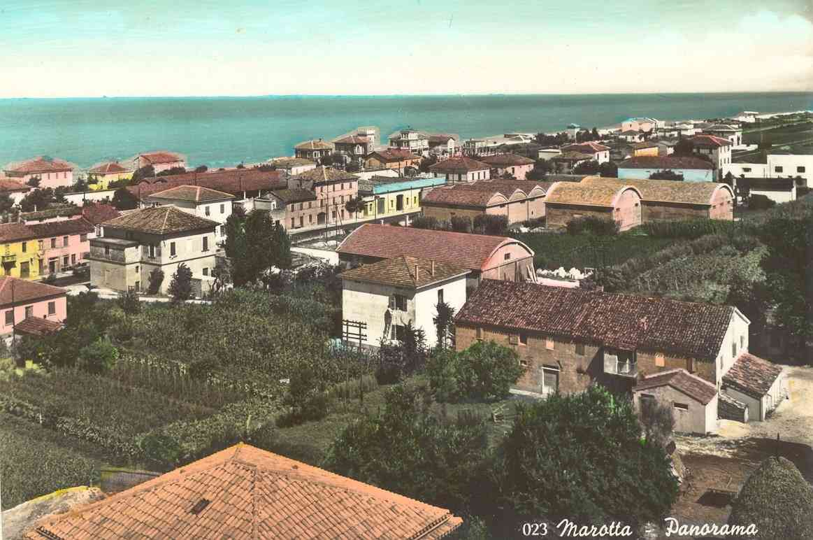 Marotta, Pesaro e Urbino, Marche, Italia - 1958